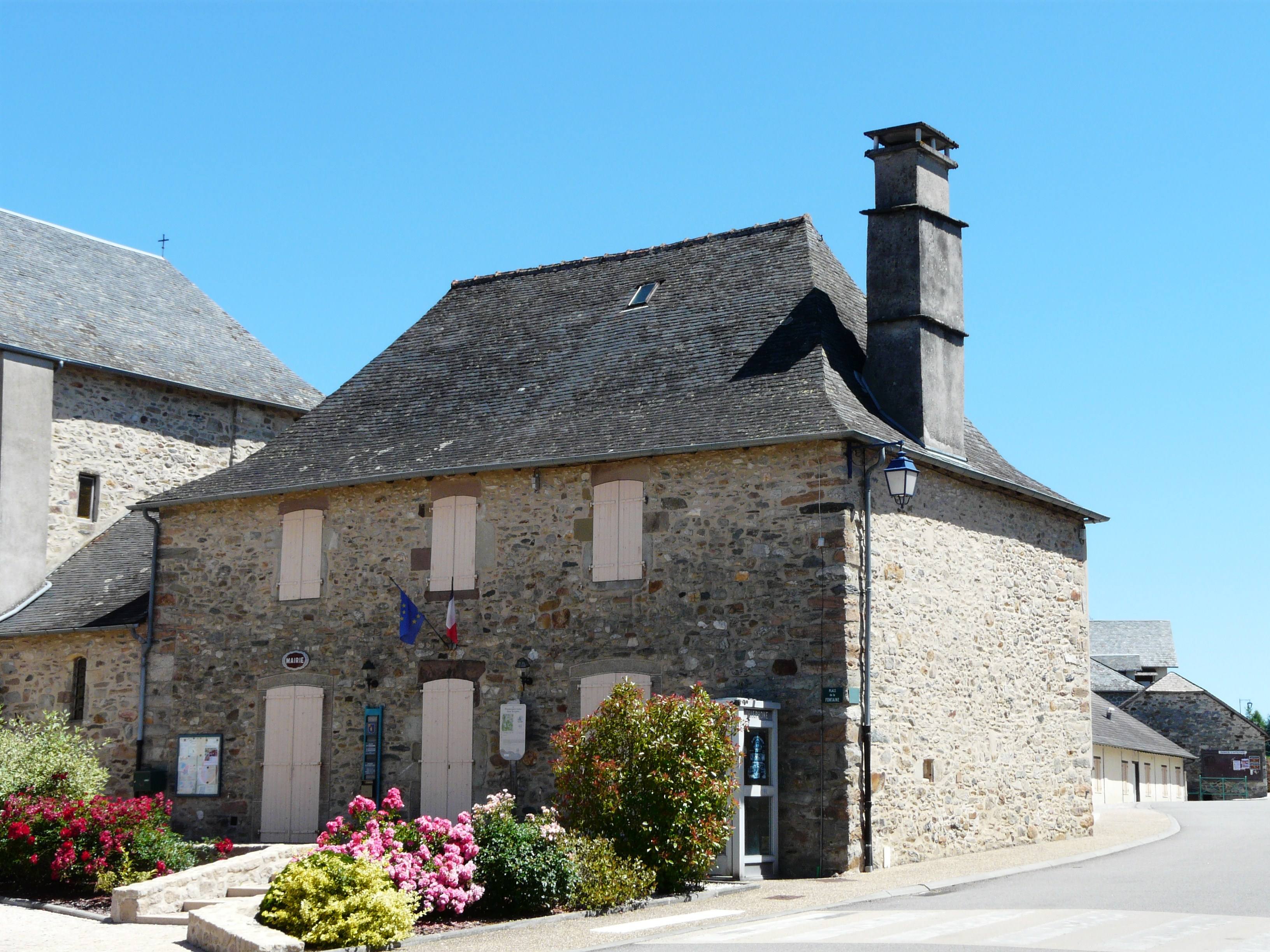 La mairie dans le bourg, Le Chastang, Corrèze, France.